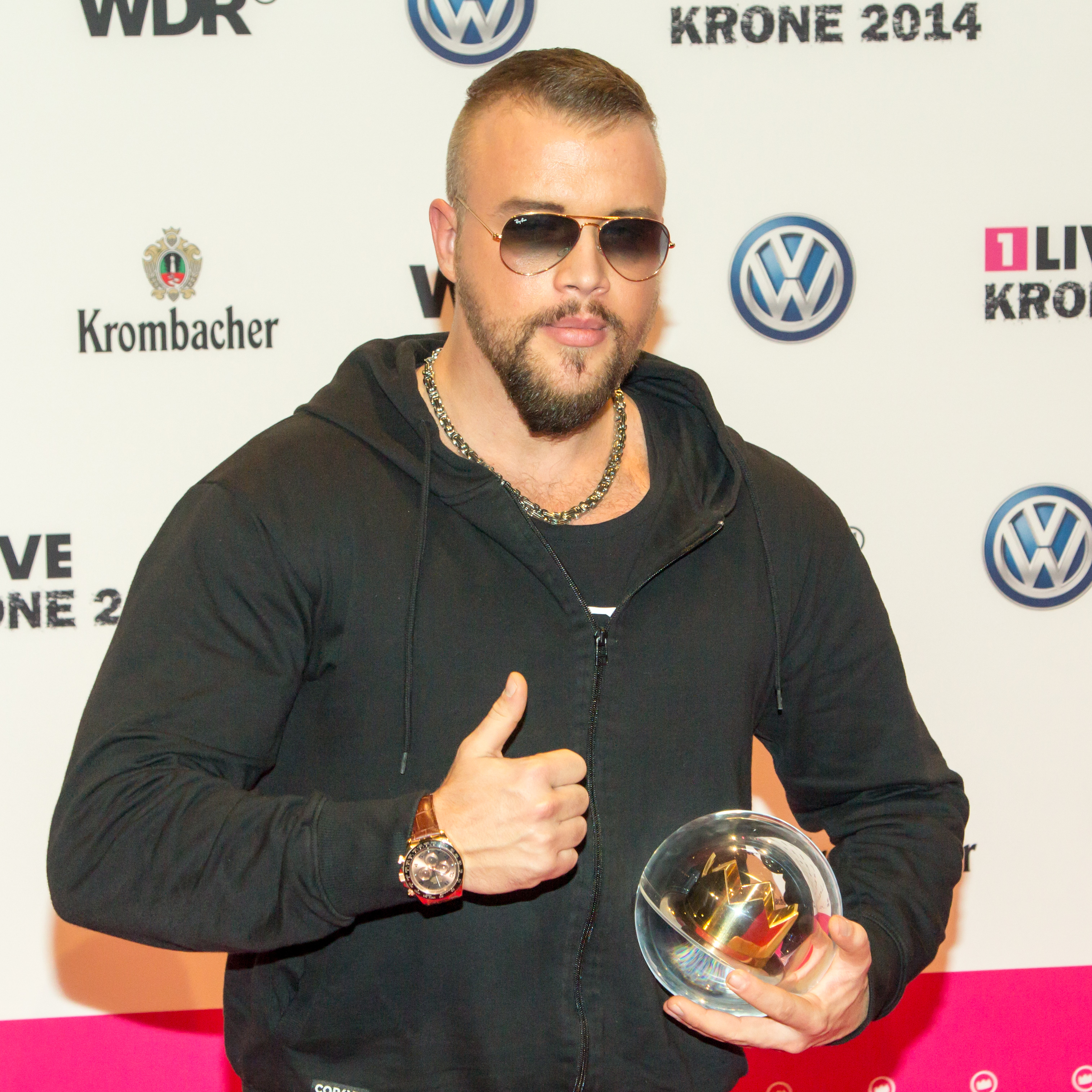 1LIVE Krone 2014 in der Bochumer Jahrhunderthalle:Bester Hip-Hop-Act Kollegah